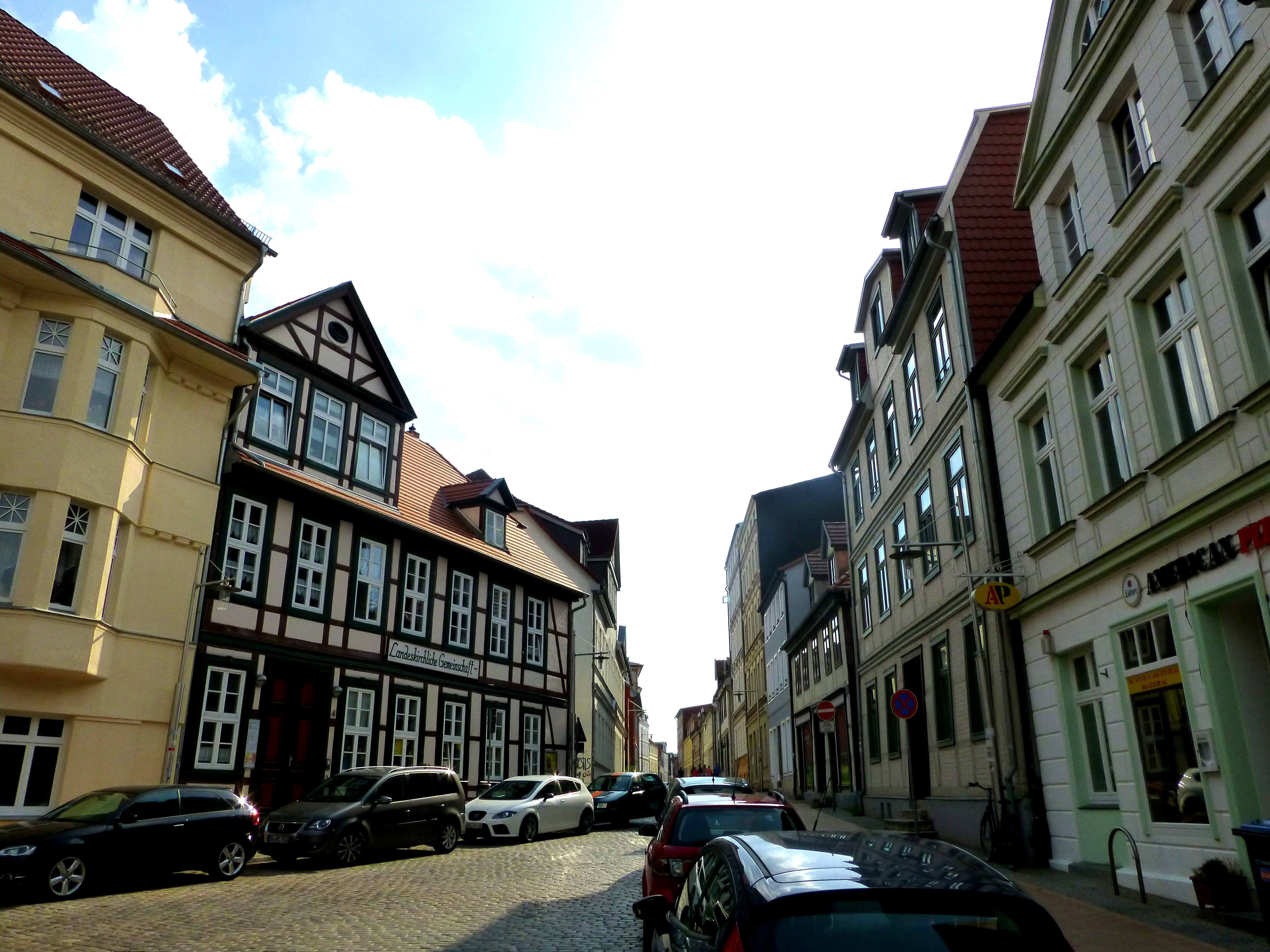 Schwerin - Ziegenmarkt, Münzstraße - Landeskirchliche Gemeinschaft